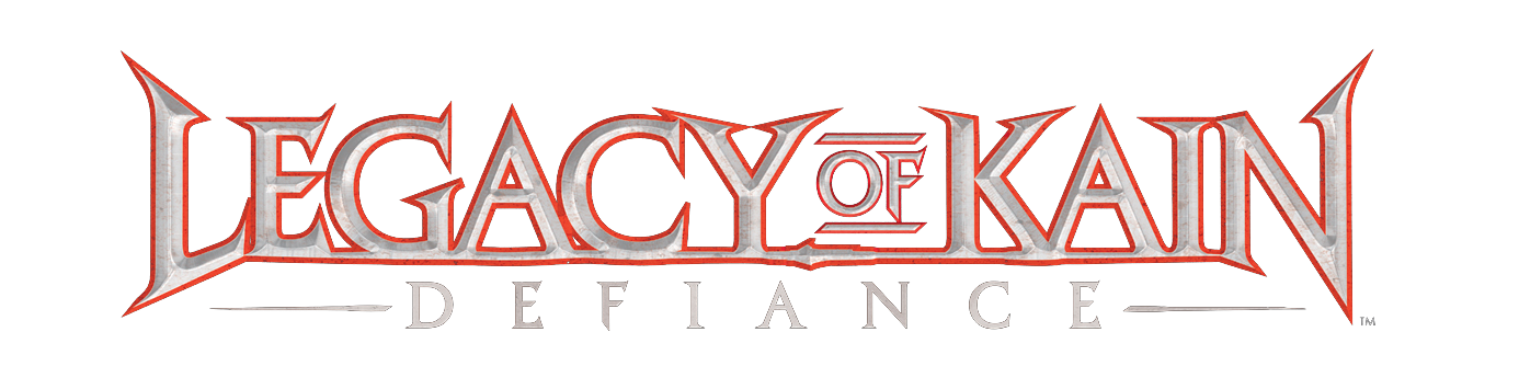 Esta imagen consiste solo en formas geométricas simples o texto. No cumple con el umbral de originalidad necesario para la protección de derechos de autor, y por lo tanto es de dominio público. Aunque está libre de restricciones de derechos de autor, esta imagen puede estar sujeta a otras restricciones. Ver para más información.